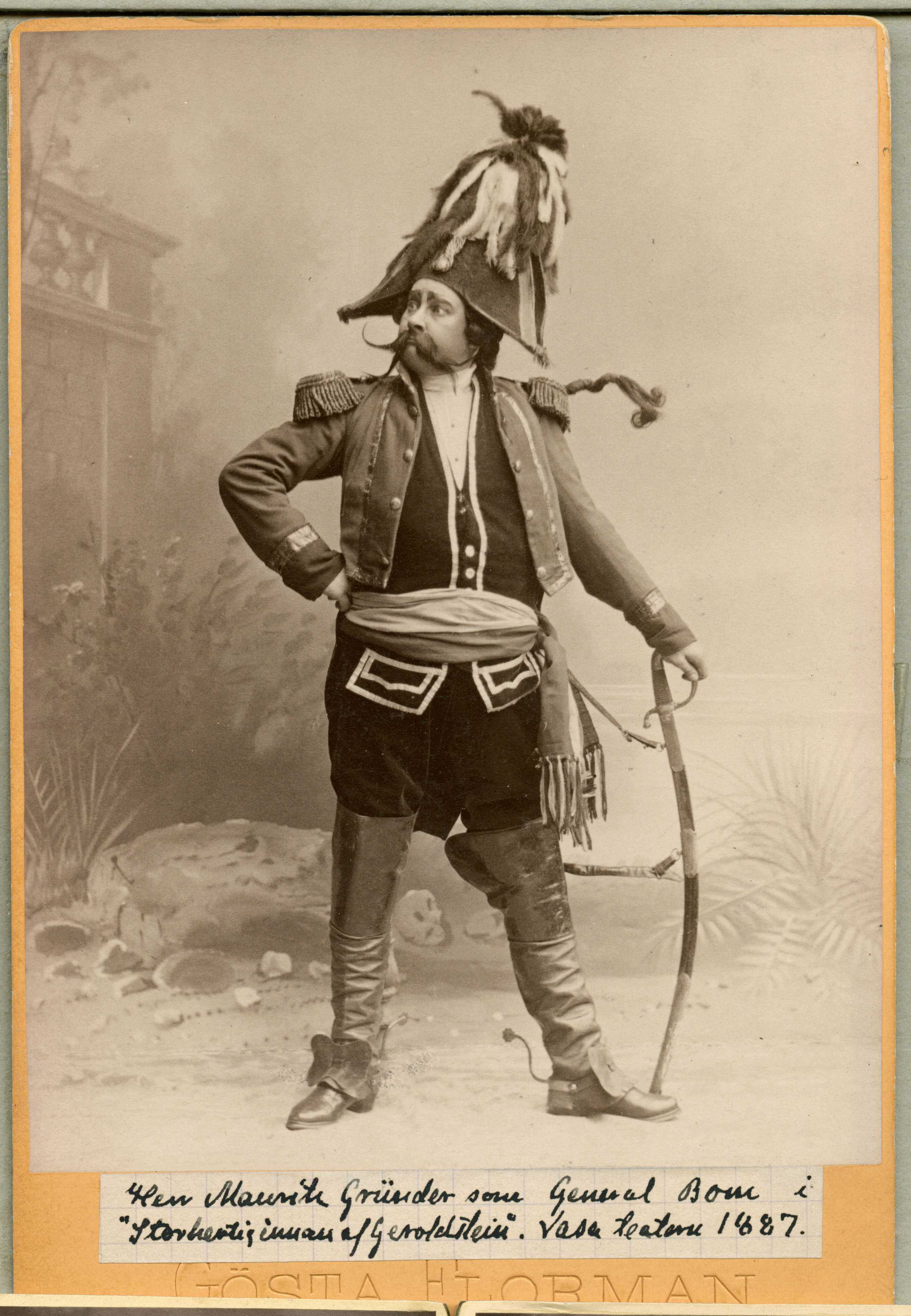 Gründer, Mauritz Gabriel (1855-1897) som General Bom i Storhertiginnan av Gerolstein = La Grande-Duchesse de Gérolstein, Vasateatern 1887